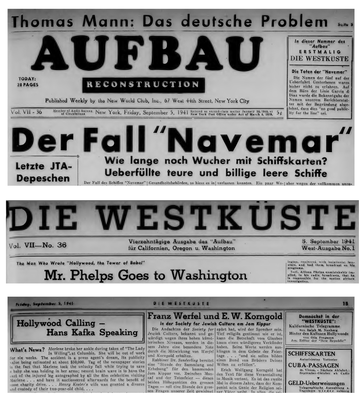 Titelkopf der Exilzeitschrift „Aufbau“ und der Beilage „Die Westküste“ No. 1 und Kolumnenkopf von "Hollywood Calling", 5. September 1941.